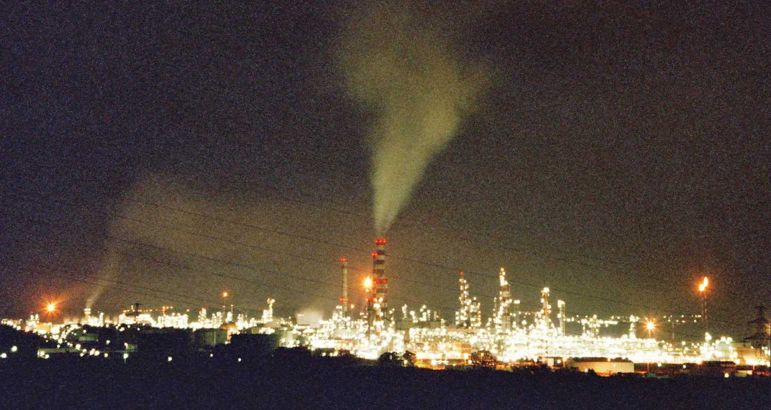 Vista nocturna d'una de les plantes del Complex Petroquímic de Tarragona.